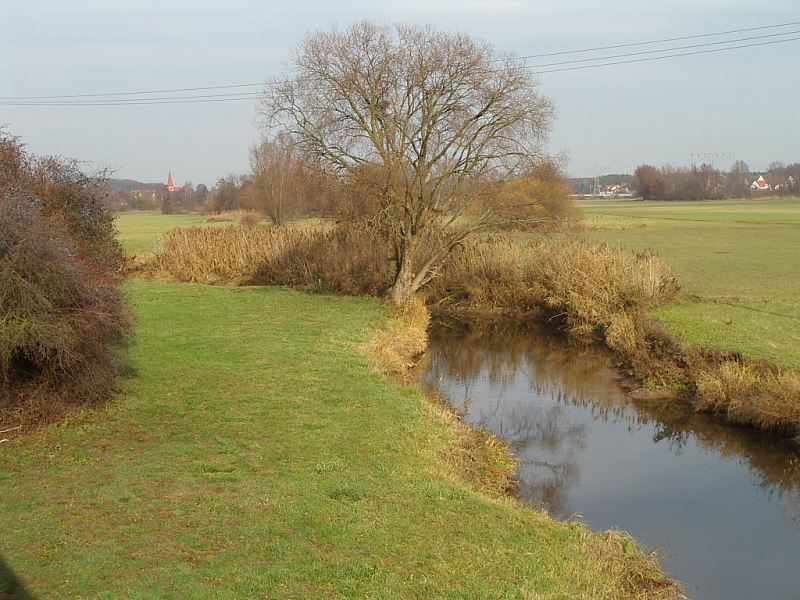 Zenn bei Atzenhof (Fürth), von der Vacher Brücke nach NO (2003-11-23), groß; Fotograph: keichwa. Im Hintergrund links die Vacher Kirche, vorne links u. a. ein Schlehenbusch.